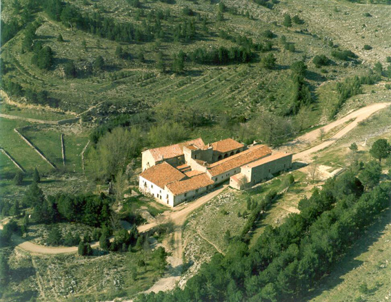 Santuario de San Juan Bautista de Peñagolosa y Santa Bárbara. Vistabella del Maestrazgo